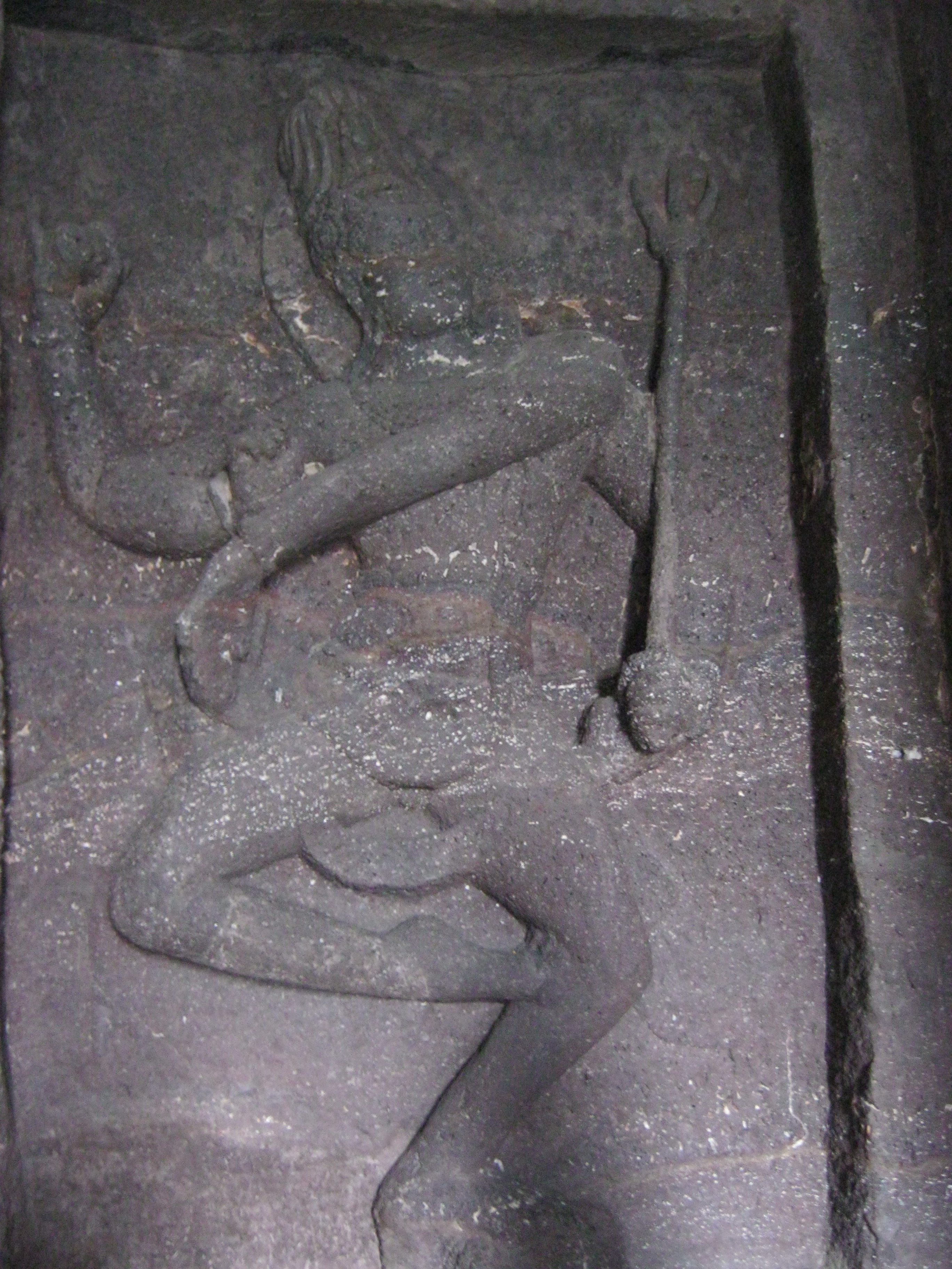 சிவபெருமான் நடனம்